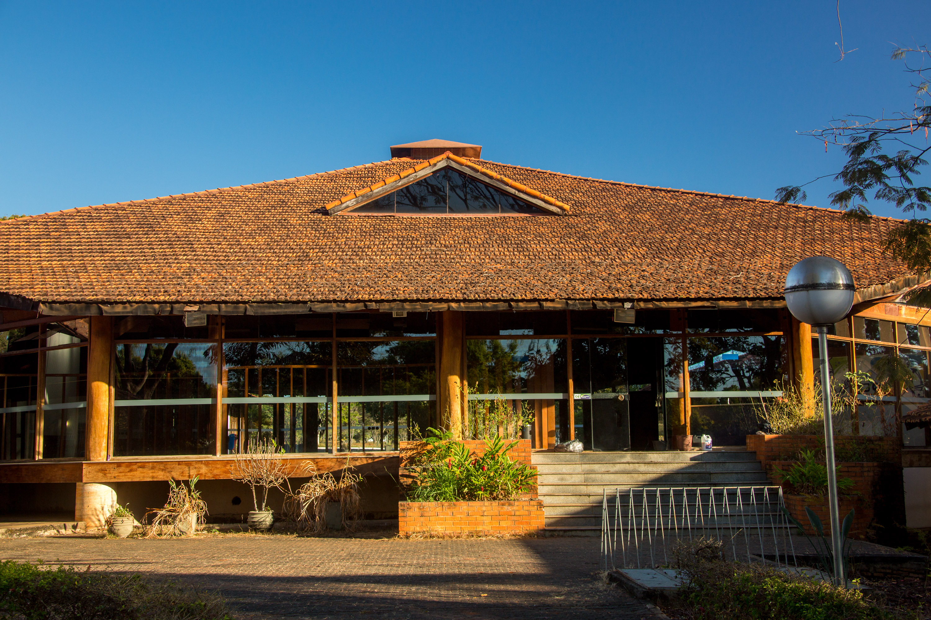 Centro de Excelência em Turismo da Universidade de Brasília. Foto: Luis Gustavo Prado/Secom UnB.